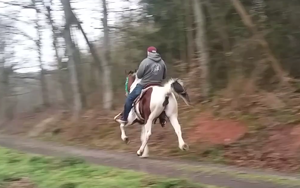 Patti Labelle, eine der ersten Zuchtstuten in Europa